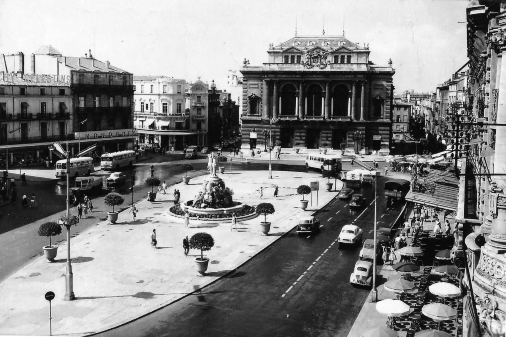 Transports en commun de Montpellier - Place de la Comédie - De gauche à droite : autobus Renault R4200 version courte, Berliet PLR & Renault 215D rénové vus dans les années 1960.